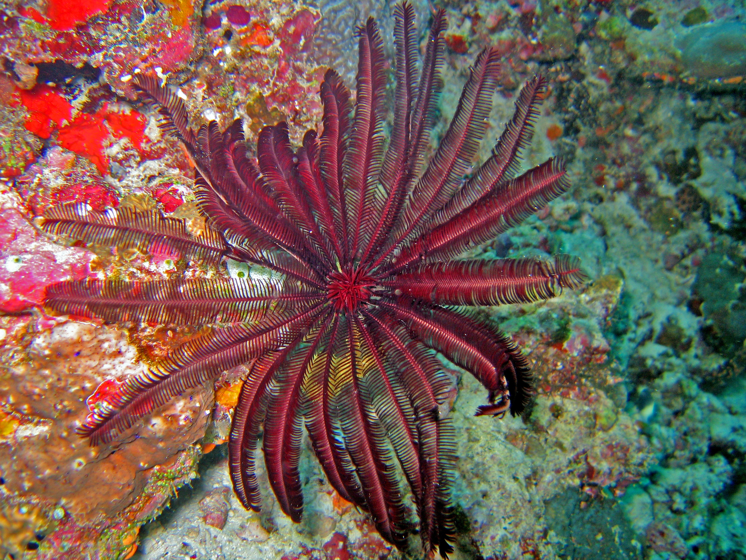 Cenometra bella in Maldives